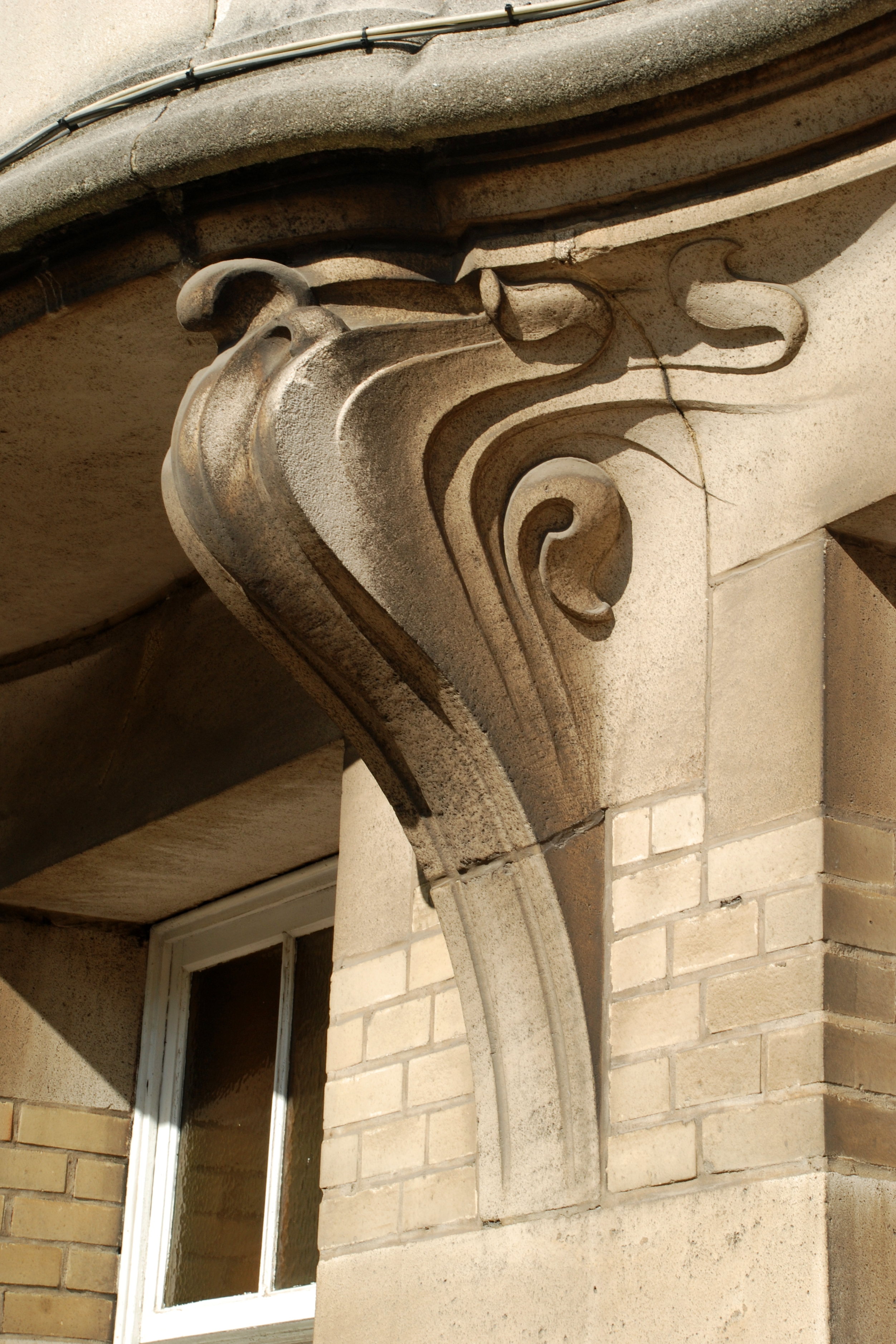 Belgique - Bruxelles - Art nouveau - Emile Lambot - Bvd du Jubilé